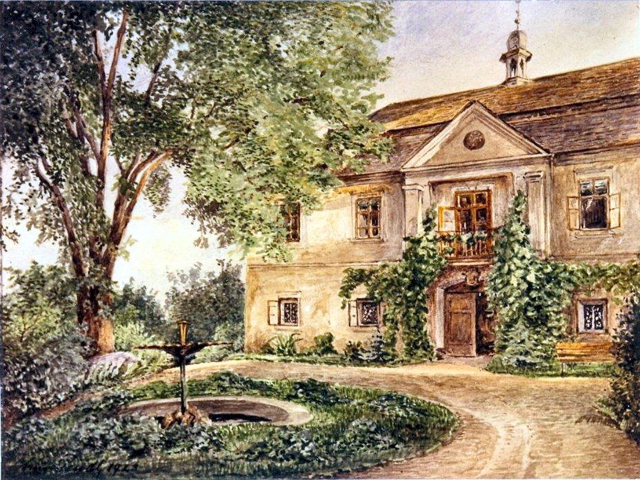 Gemälde einer Teilansicht von Schloss Leitersdorf bei Troppau - Hier: Neues Schloss im 19. Jahrhundert